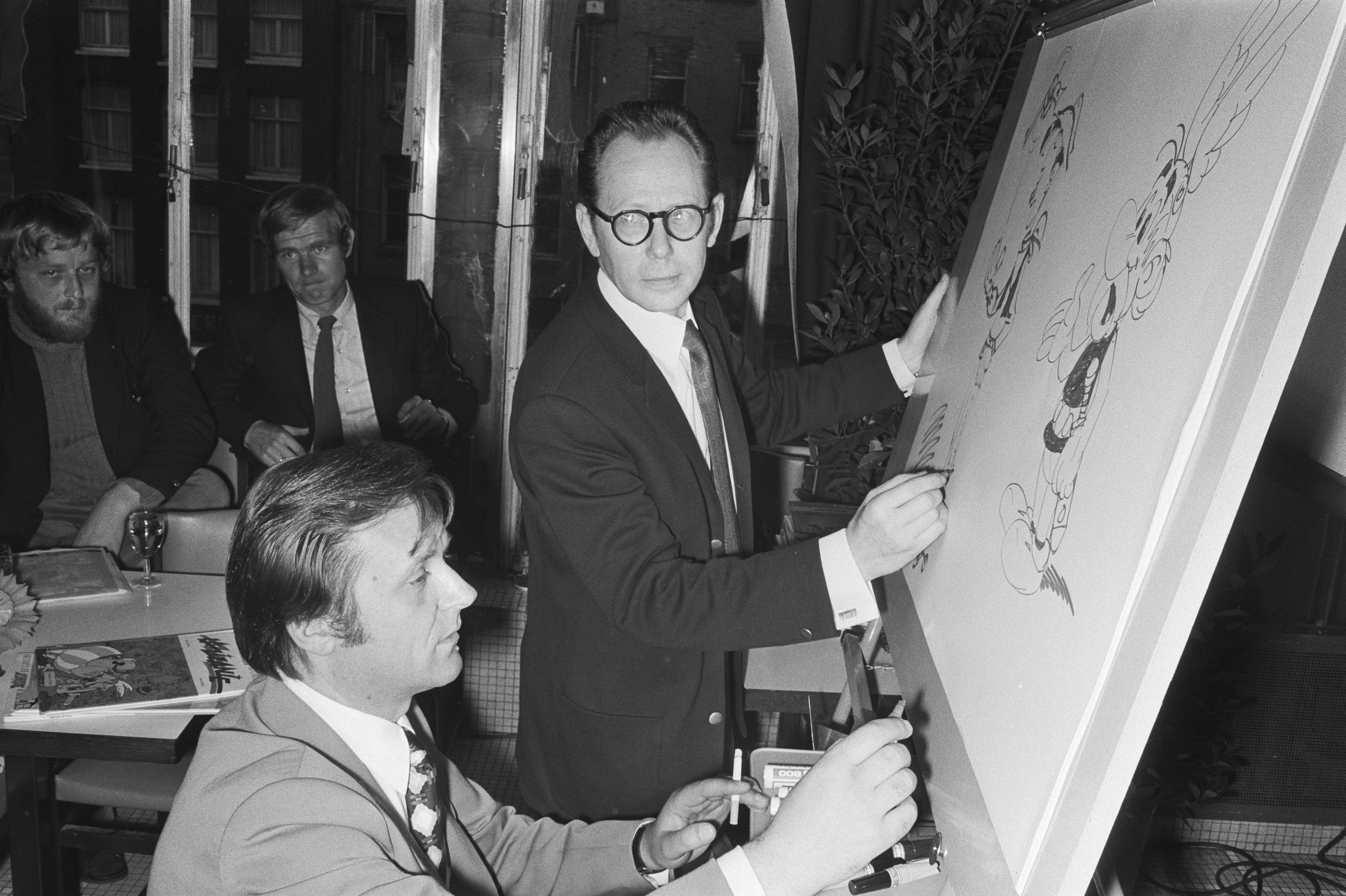 Collectie / Archief : Fotocollectie Anefo Reportage / Serie : Schrijvers van stripverhalen Bijenkorf, Amsterdam Beschrijving : Gehurkt Albert Uderzo (tekenaar Asterix) en staand Morris (tekenaar Lucky Luke) Datum : 27 mei 1971 Locatie : Amsterdam, Noord-Holland Trefwoorden : strips, tekenaars, tekeningen Persoonsnaam : Morris (striptekenaar), Uderzo, Albert Fotograaf : Fotograaf Onbekend / Anefo Auteursrechthebbende : Nationaal Archief Materiaalsoort : Negatief (zwart/wit) Nummer archiefinventaris : bekijk toegang 2.24.01.05 Bestanddeelnummer : 924-5896